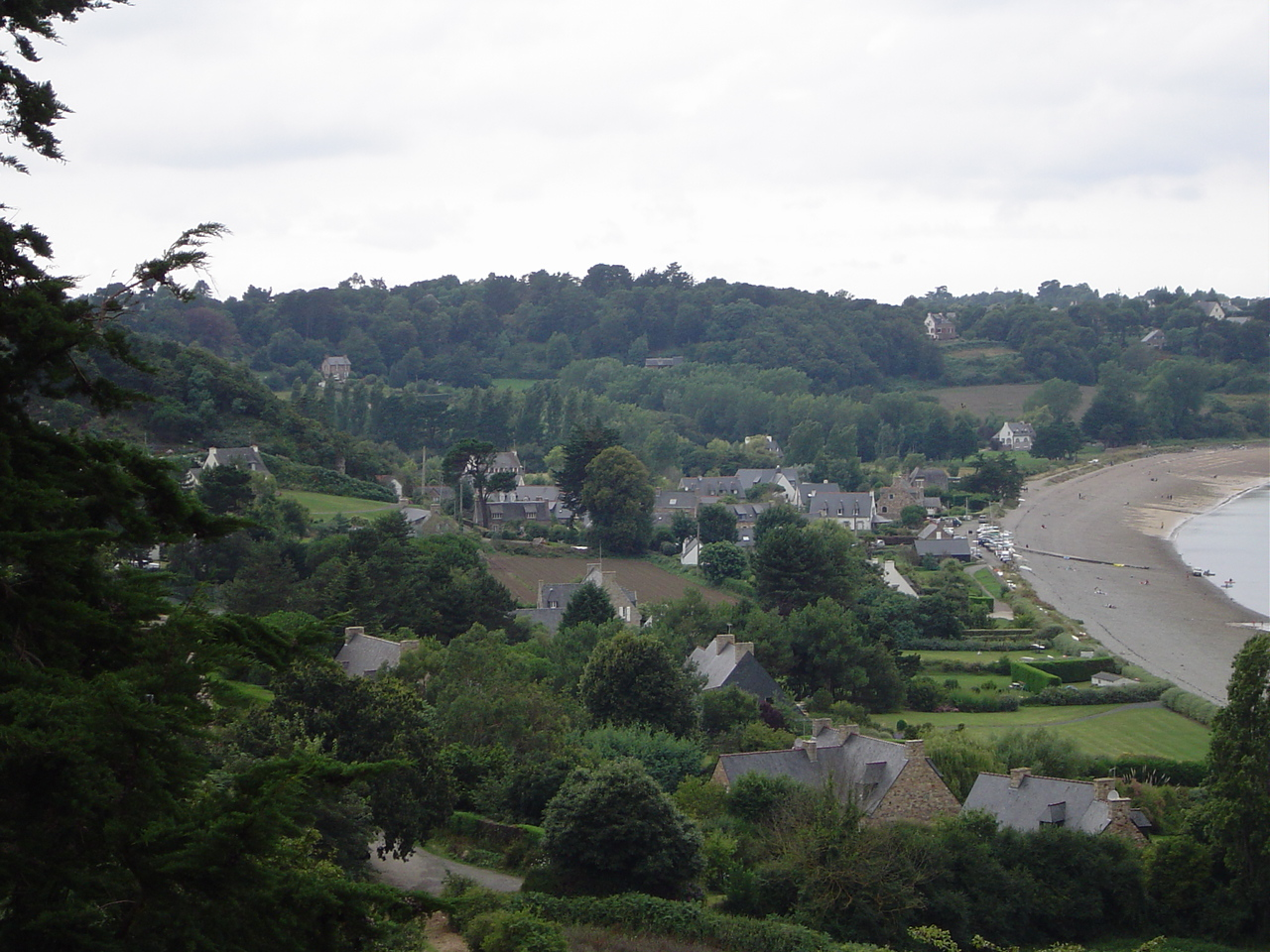 Village et baie de Launay, Ploubazlanec (22) Oeuvre personnelle 2007